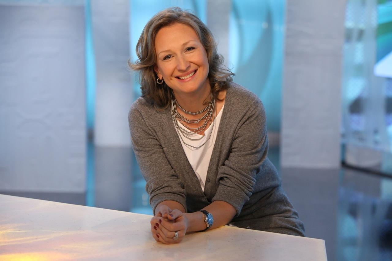 Григорьева Наталья Эдуардовна